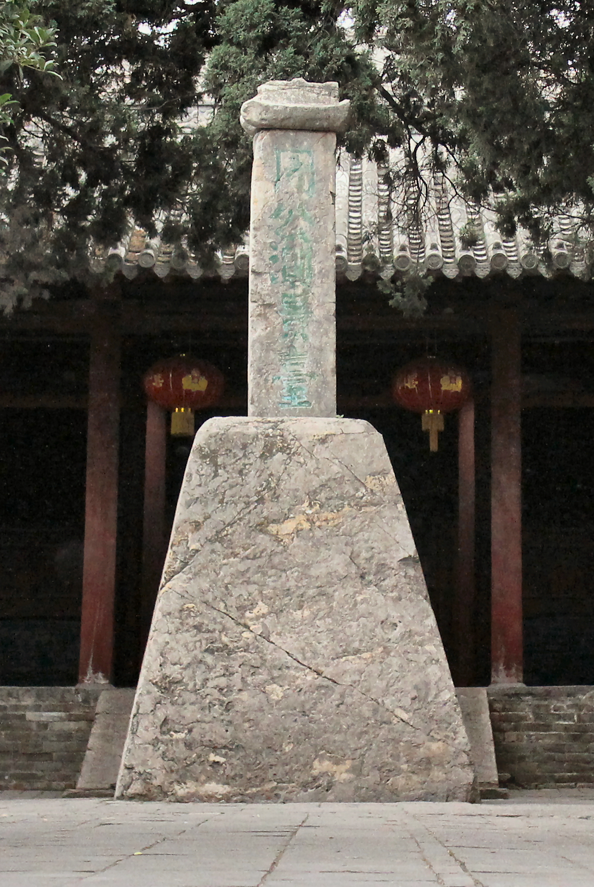 Gros plan du gnomon conservé à l'observatoire ancien de Gaocheng